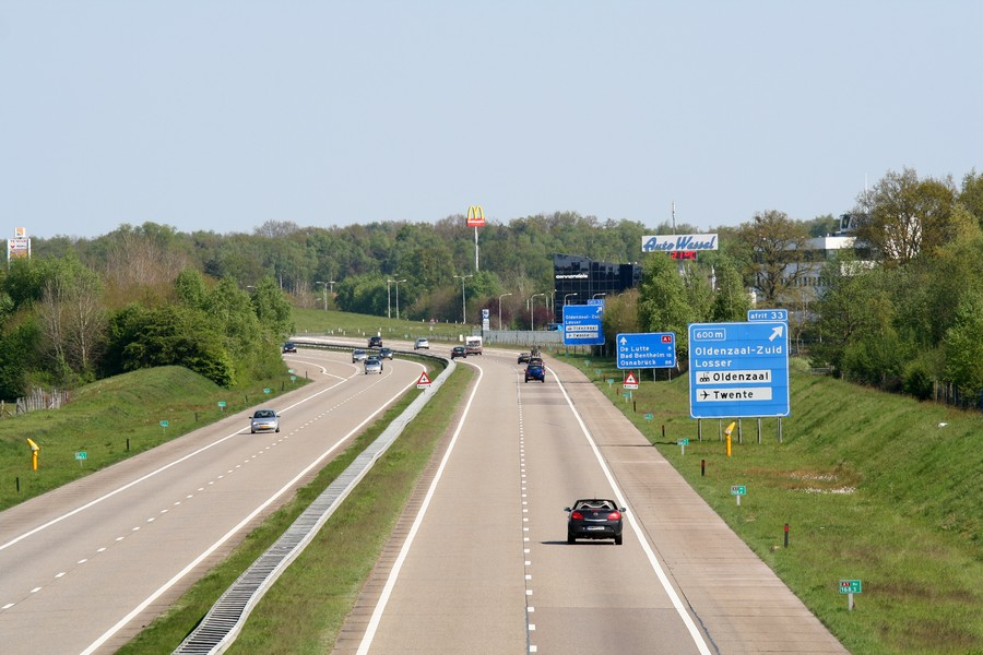 Oldenzaal, A1 near Het Hazewinkel/Hanzepoort